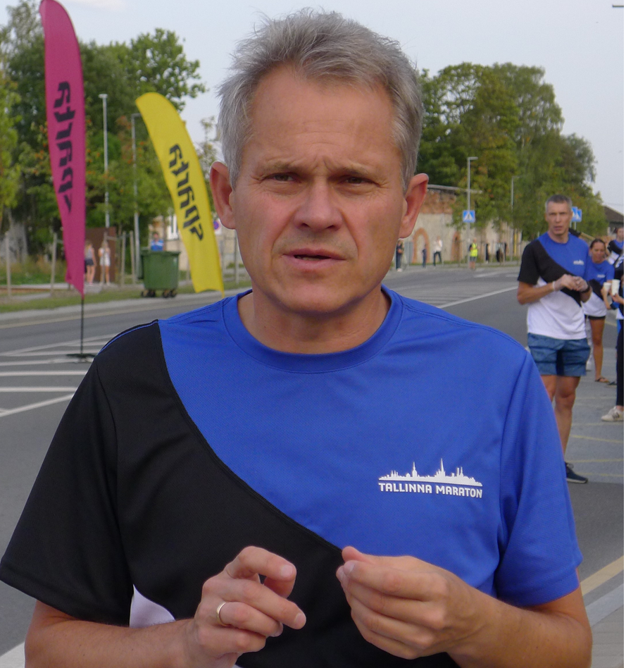 Ülo Suursaar 2018 Tallinna Maratonil